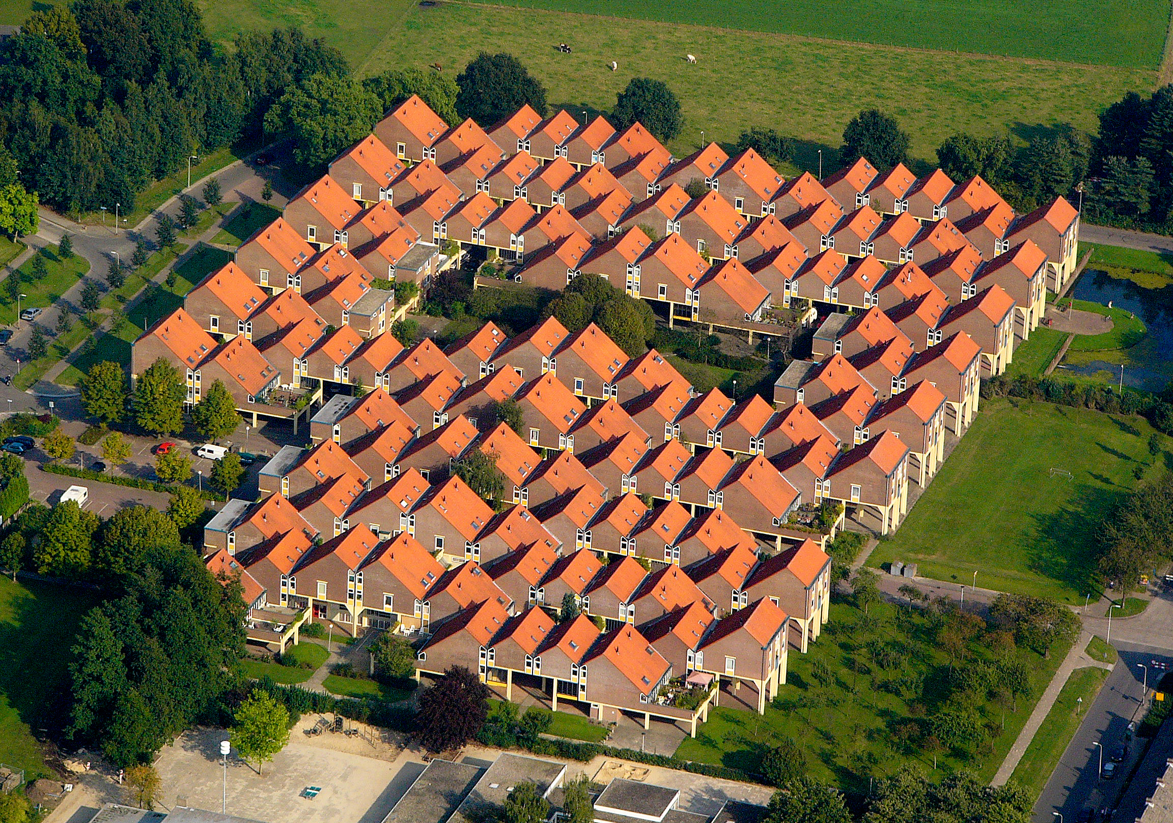 "De Kasbah" in Hengelo, Overijssel by Piet Blom